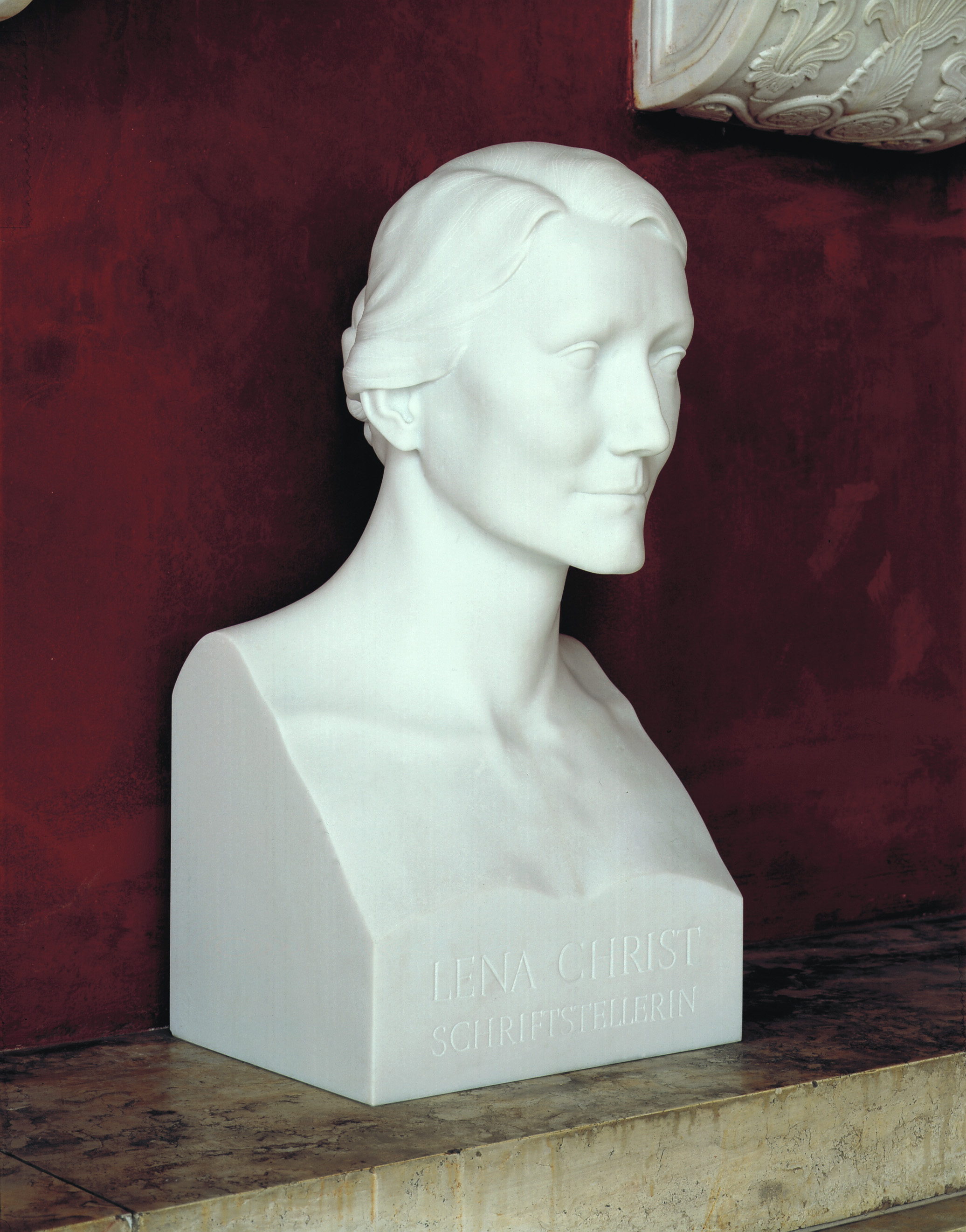 Martin Kargruber 1999, Bildnisbüste Lena Christ, Laaser Marmor, 74x38x37cm, Ruhmeshalle München